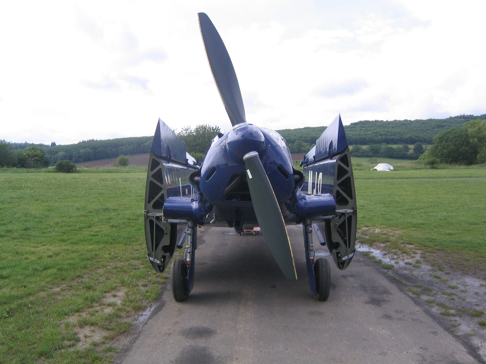 Bf 108 mit Me P7 Propeller und angelegten Tragflächen